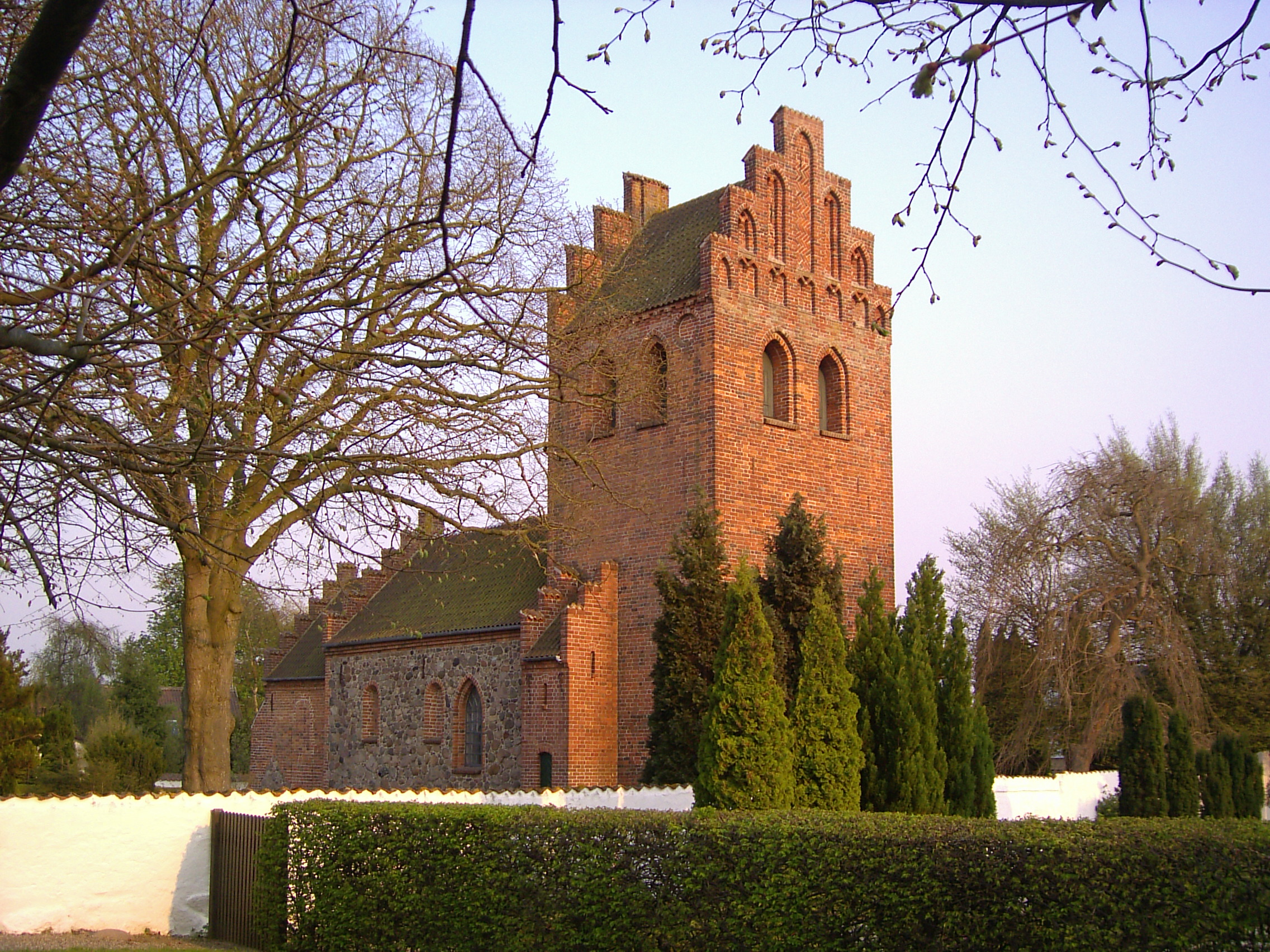 Gørløse kirke, Gørløse Sogn, Lynge-Frederiksborg Herred, Frederiksborg Amt